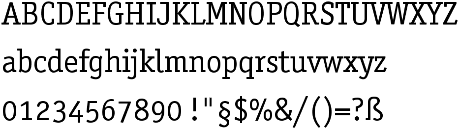 Schriftartenmuster der Officina serif